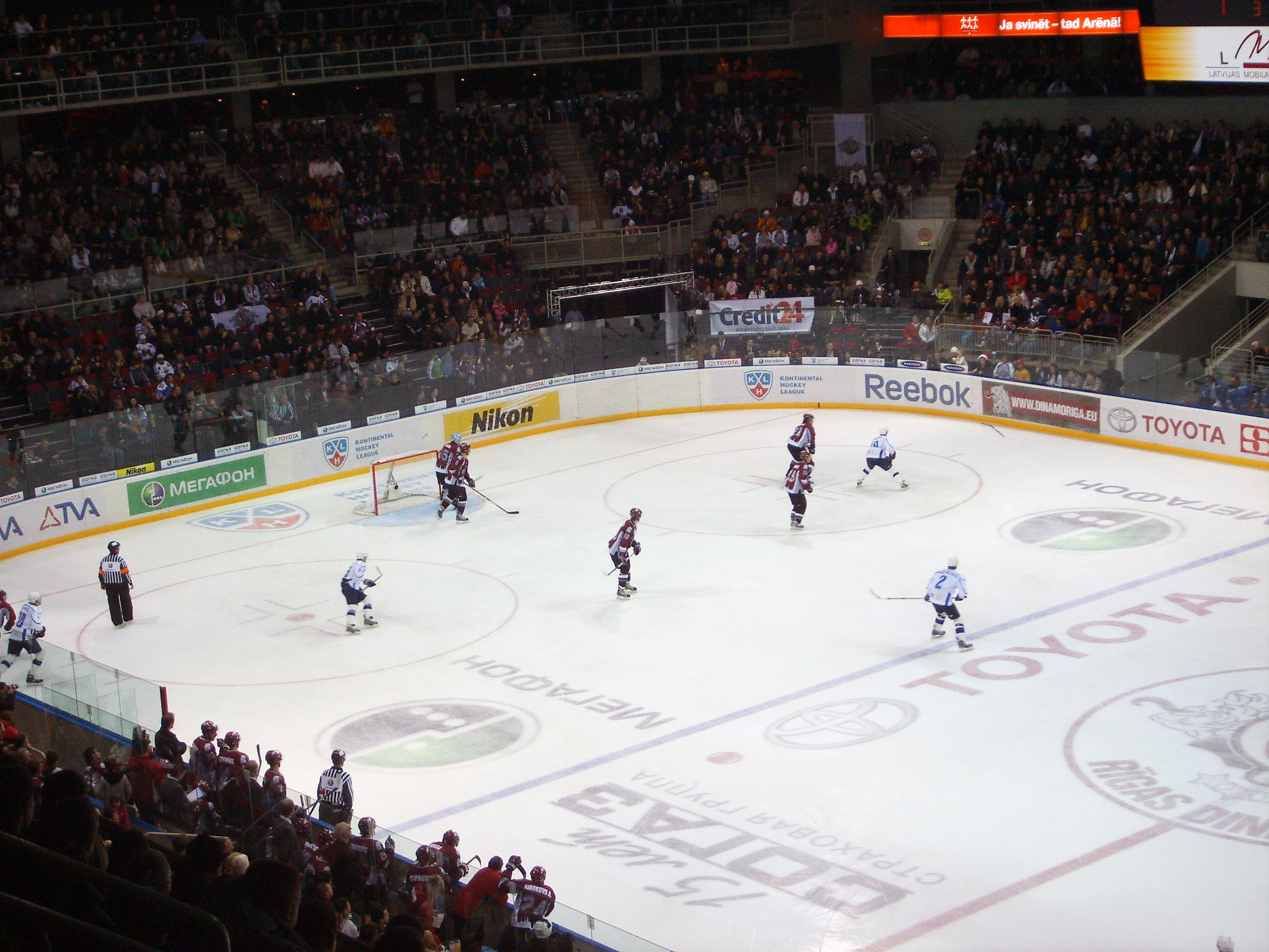 KHL-Game Dinamo Rigas - Barys Astana